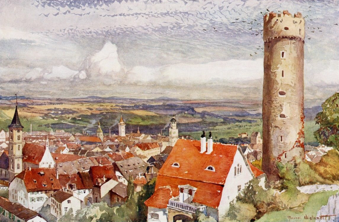 Ravensburg, Blick auf Mehlsack, ev. Stadtkirche und Innenstadt